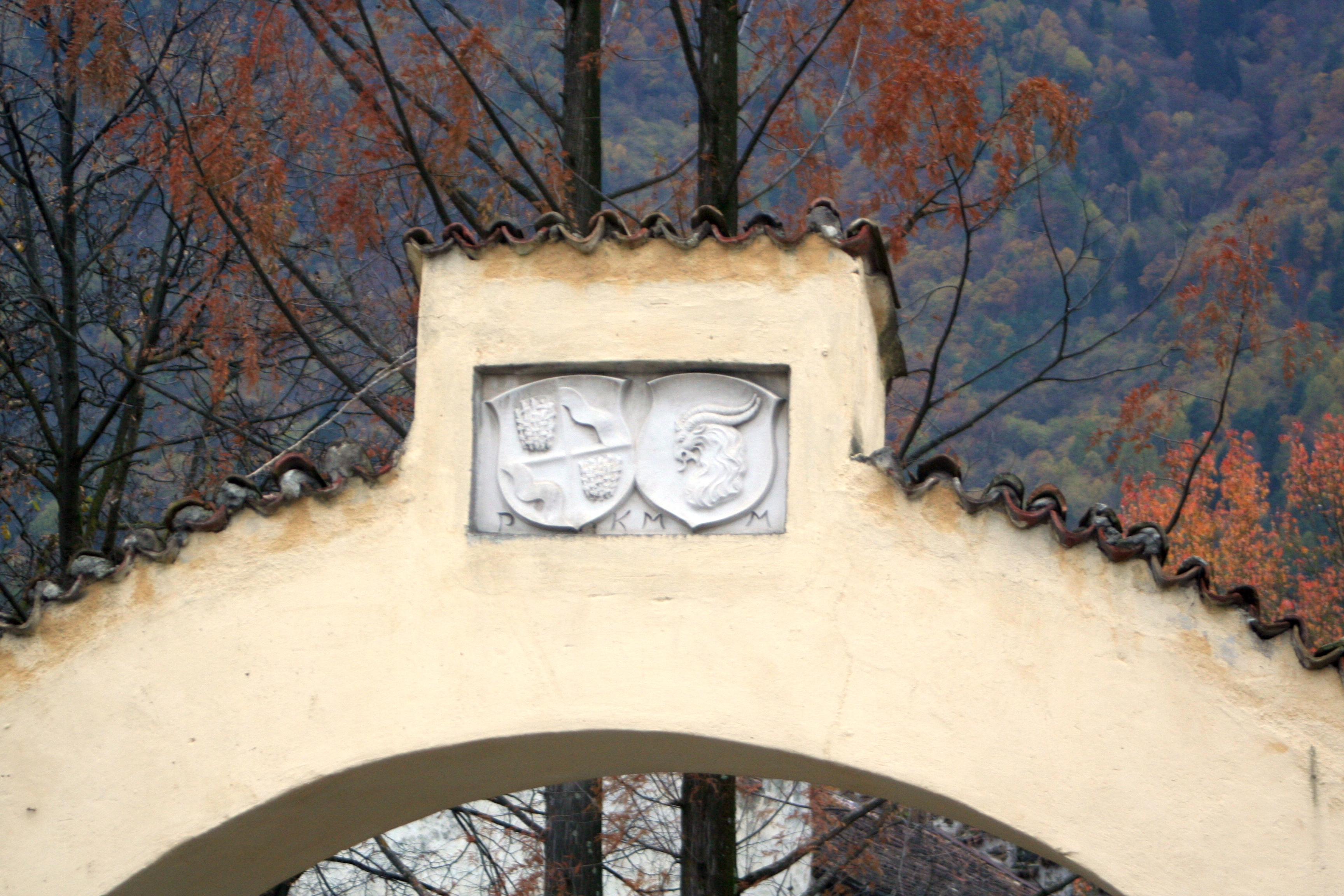 Wappen im Torbogen vom Ansitz Kränzl in Tscherms